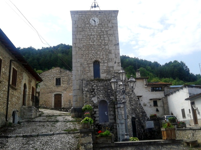 Il campanile della chiesa scomparsa di San Martino in Agne